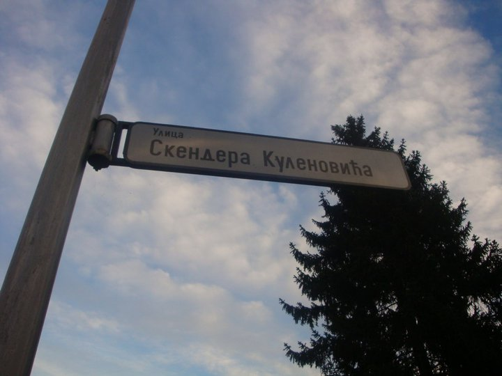 Улица_Скендера_Куленовића_у_Бањој_Луци